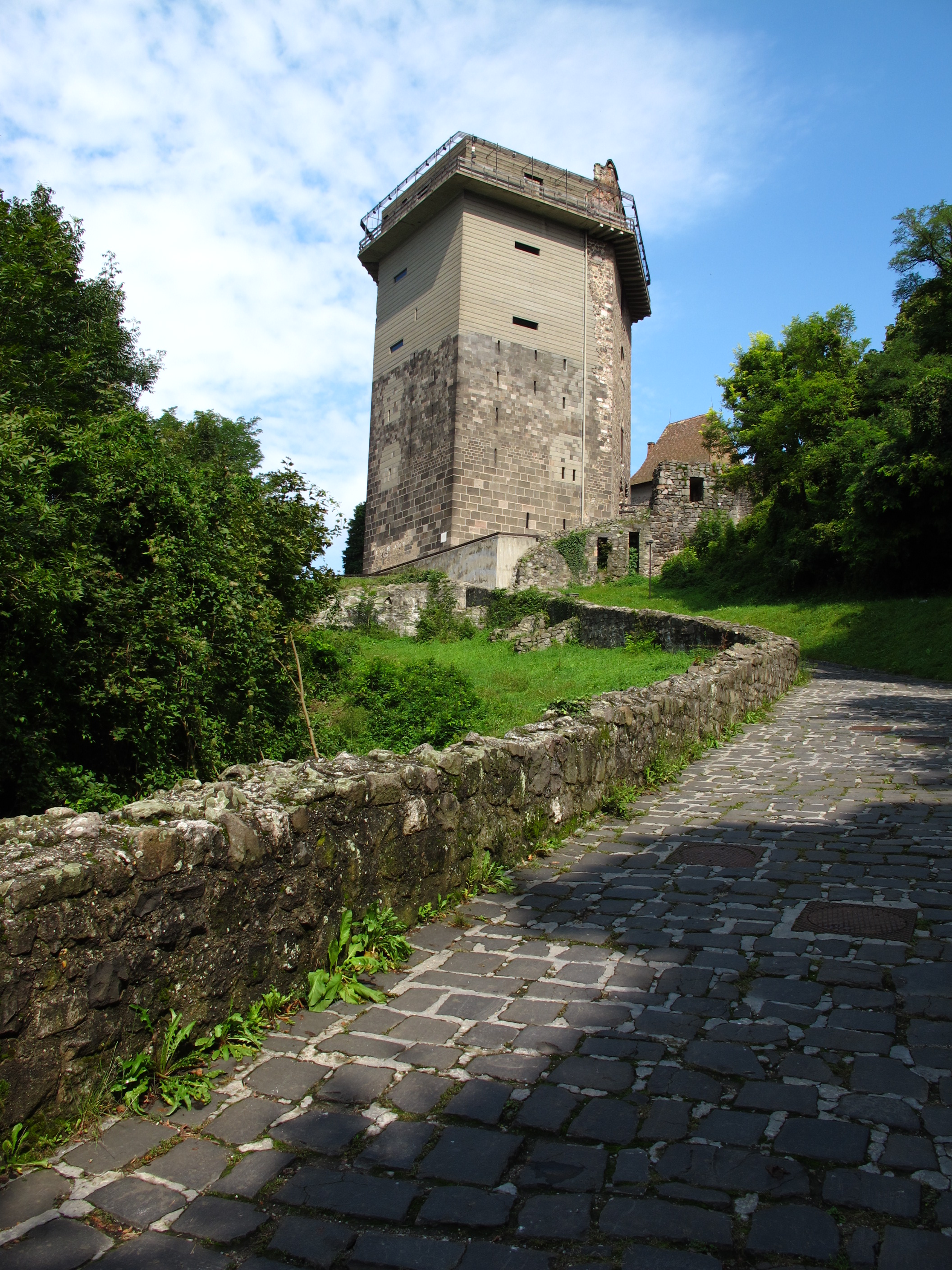 Alsóvár (Salamon-torony) This is a photo of a monument in Hungary. Identifier: 7606